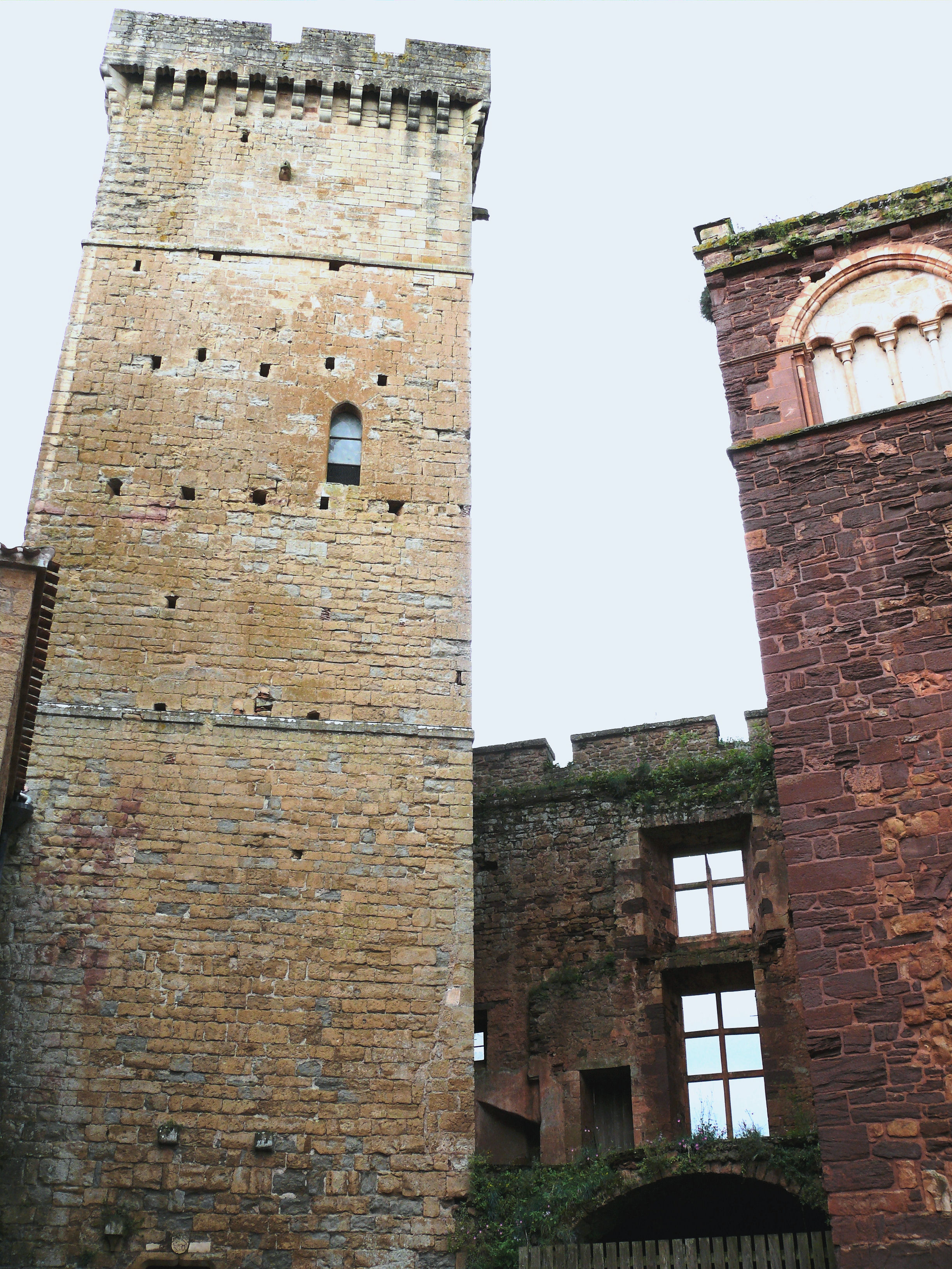 Château de Castelnau-Bretenoux - Donjon et tour de l'auditoire